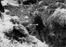 La fossa